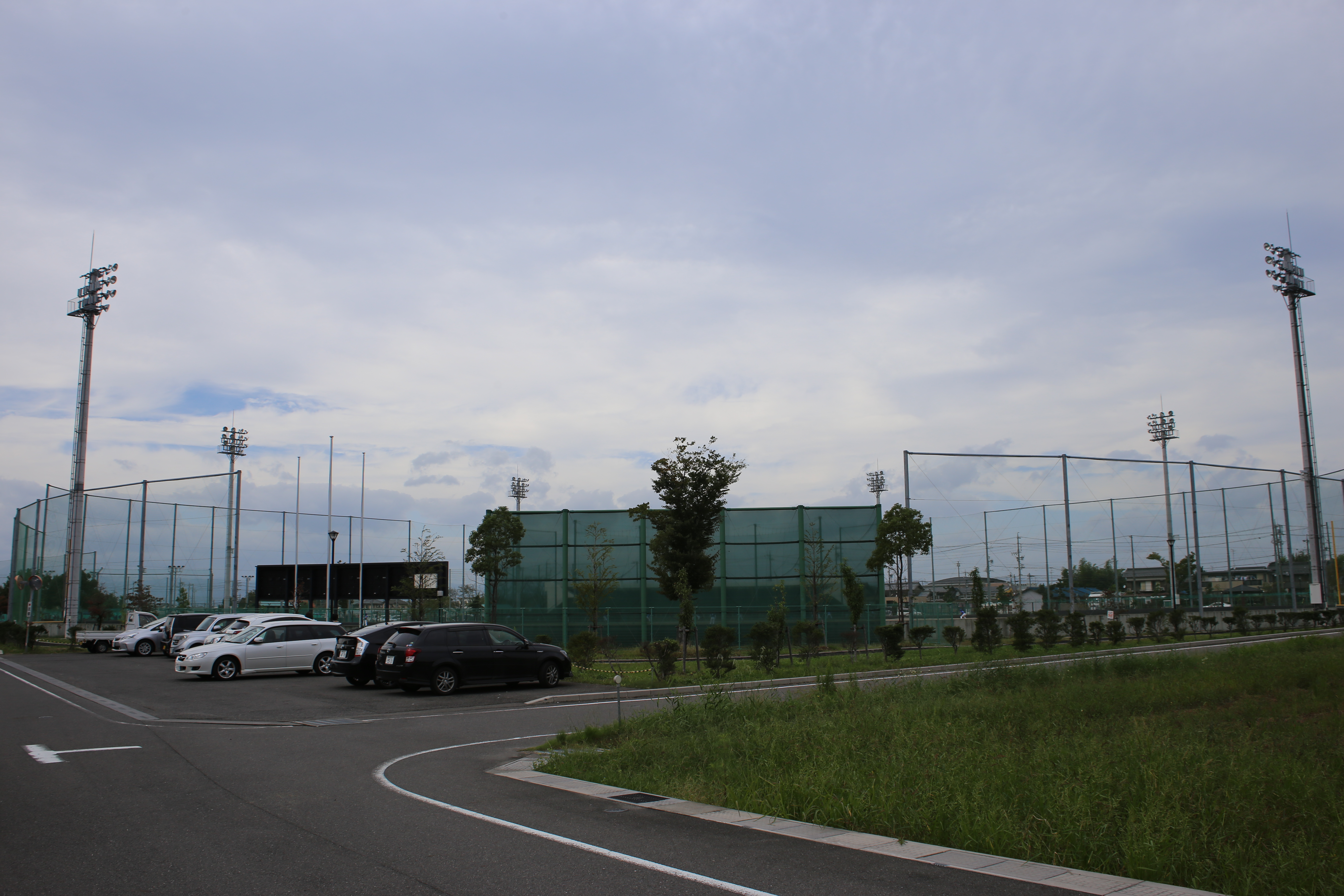 岐阜県羽島市の羽島市総合運動場